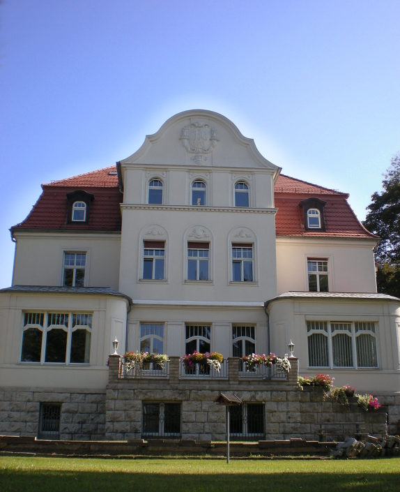 Villa Feistkorn 2, Goethestraße 6, Gera, Thüringen